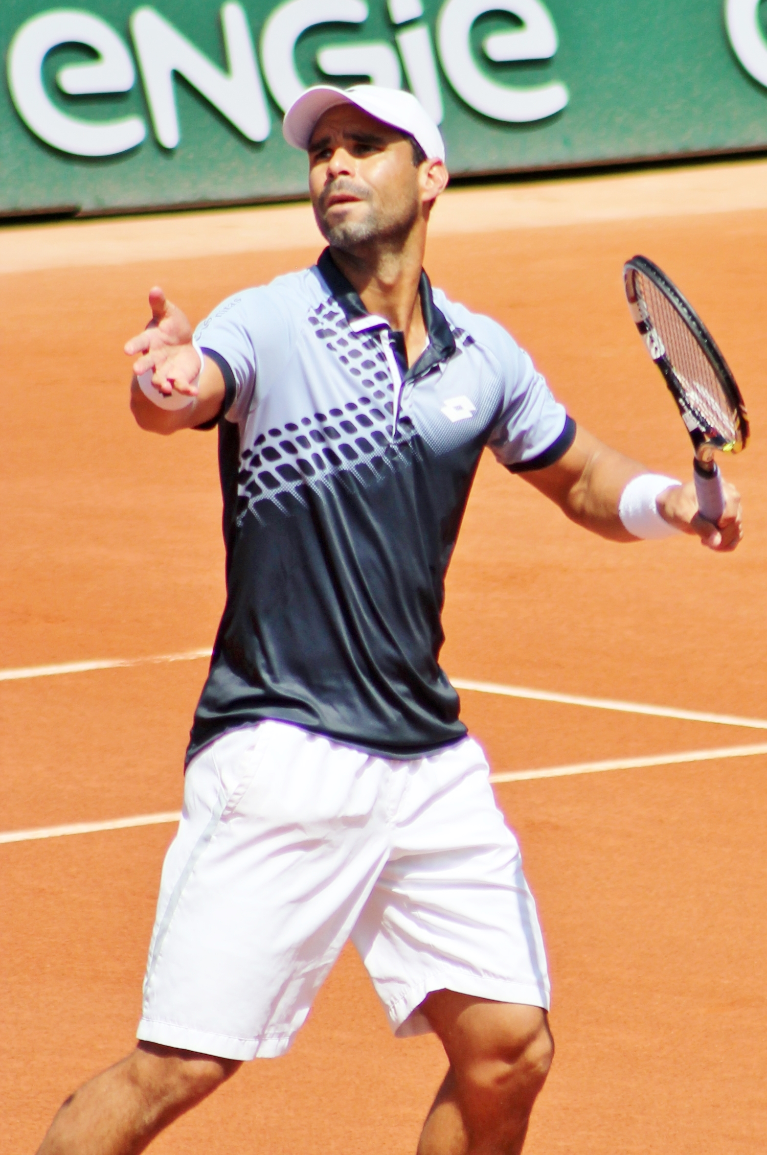 Falla RG15 (5)